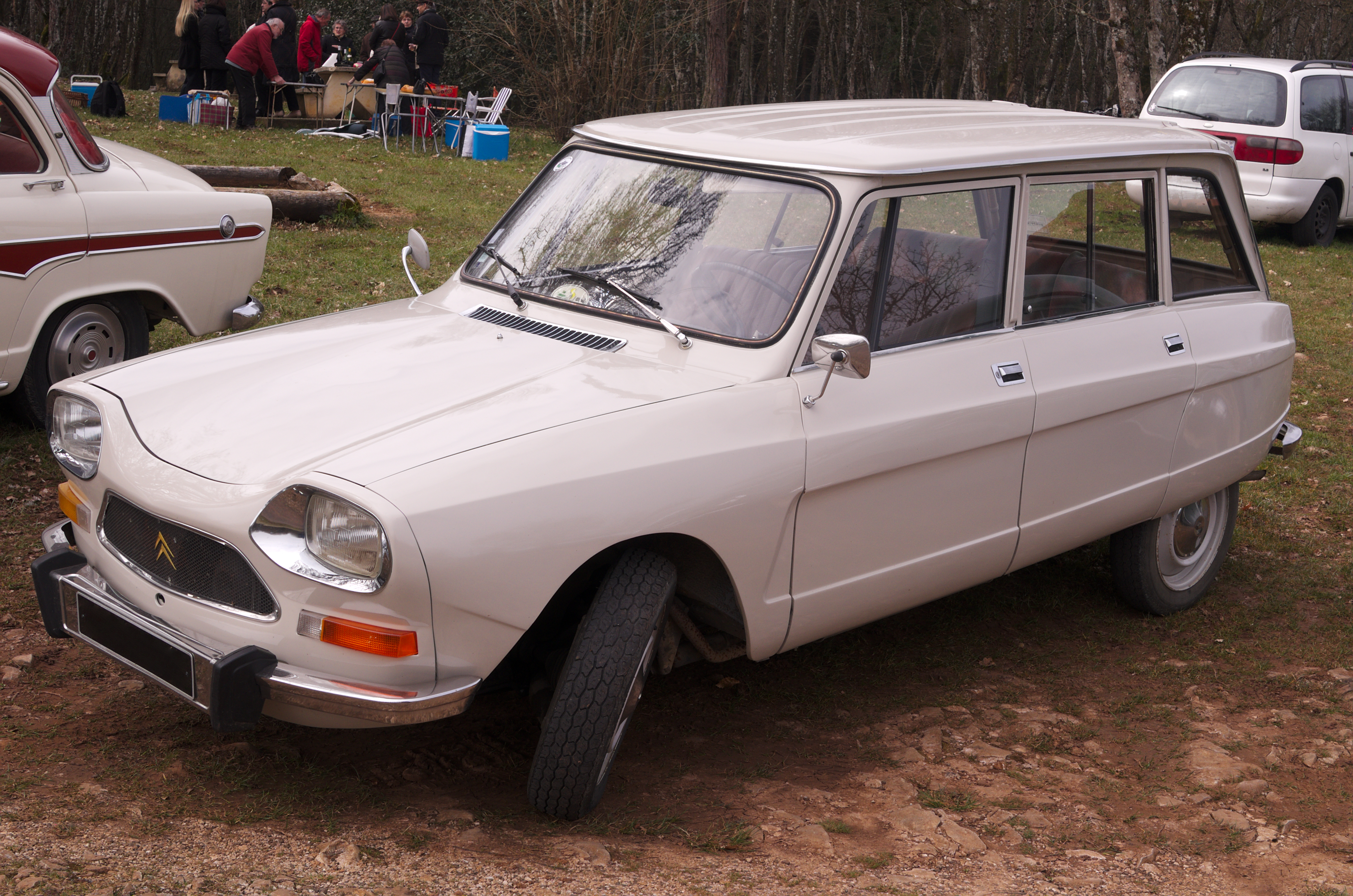 Sortie Soupapes dégrippées 07-04-2013 - Ami 8